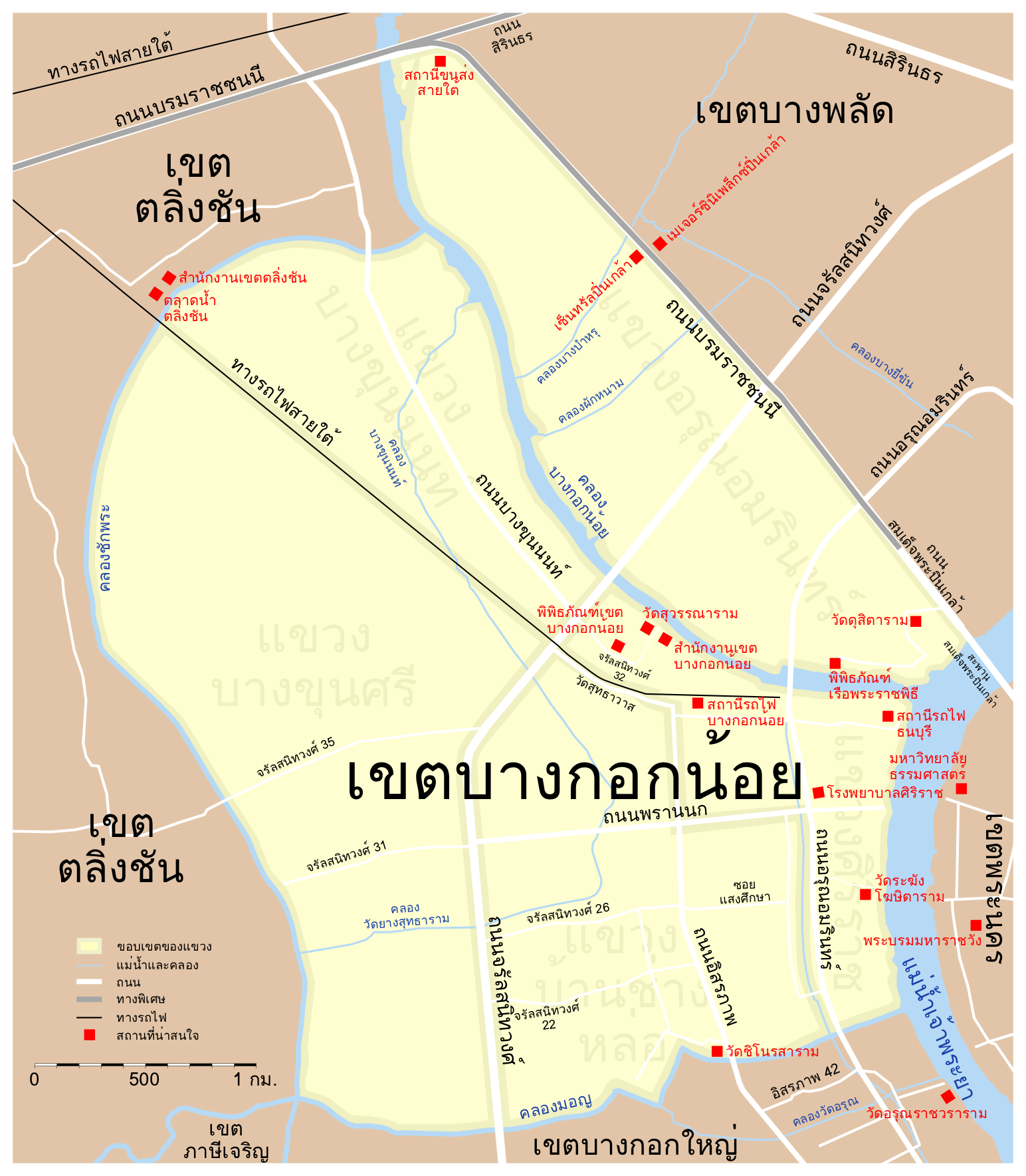 แผนที่เขตบางกอกน้อย